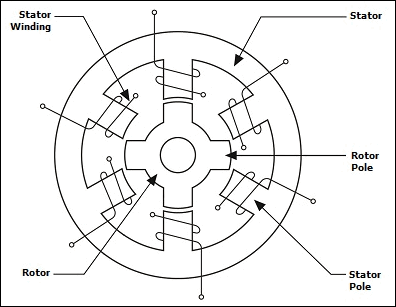 شمای کلی ماشین سویچ رلوکتانسی (SRM)